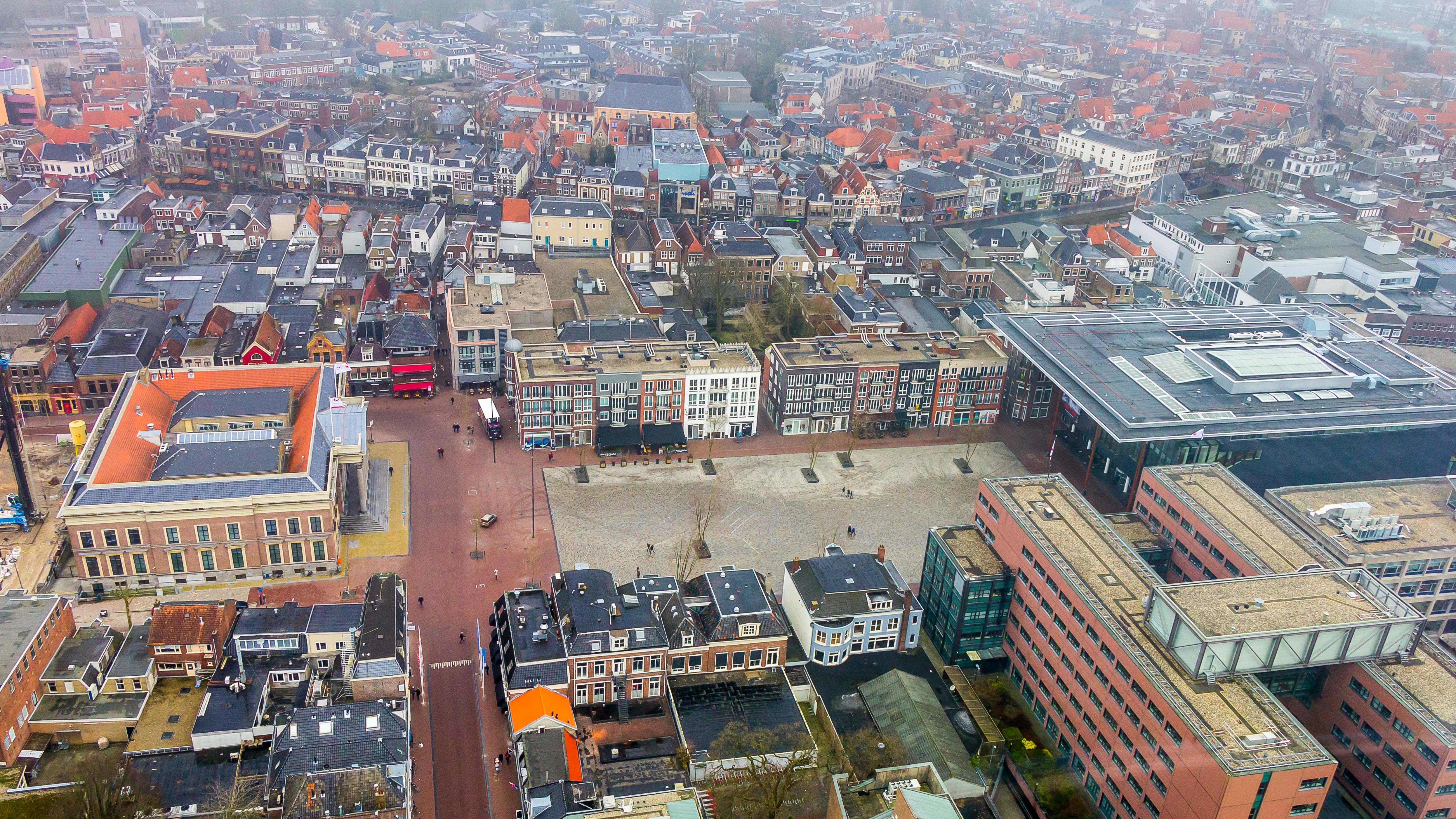 Paleis van Justitie, Wilhelminaplein, Fries Museum, Leeuwarden